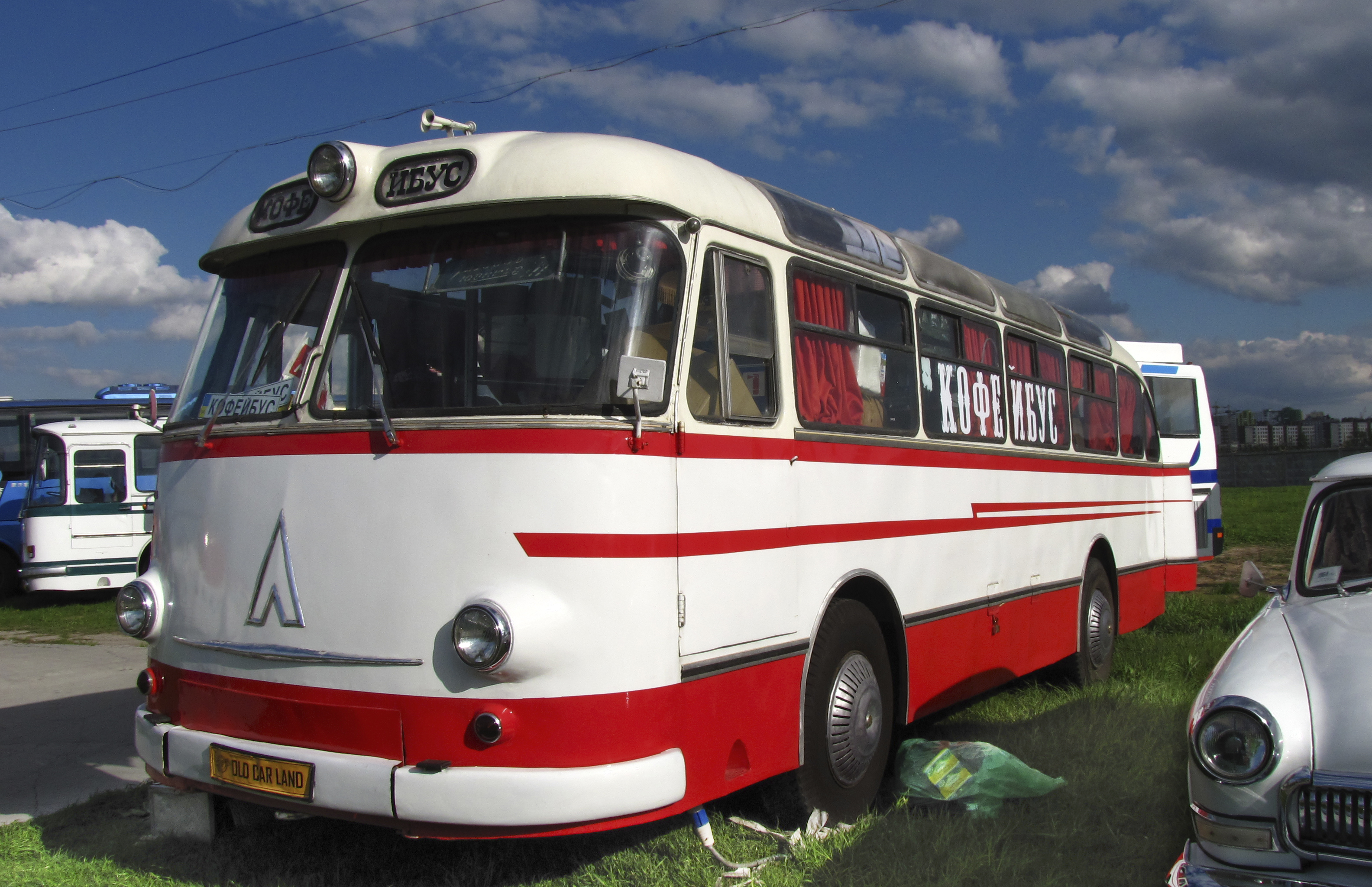 Автобус ЛАЗ-695Б (возможно ЛАЗ-695Е). Уникальный экземпляр, до сегодняшнего дня дожили считанные единицы этой модификации 695-го ЛАЗа.